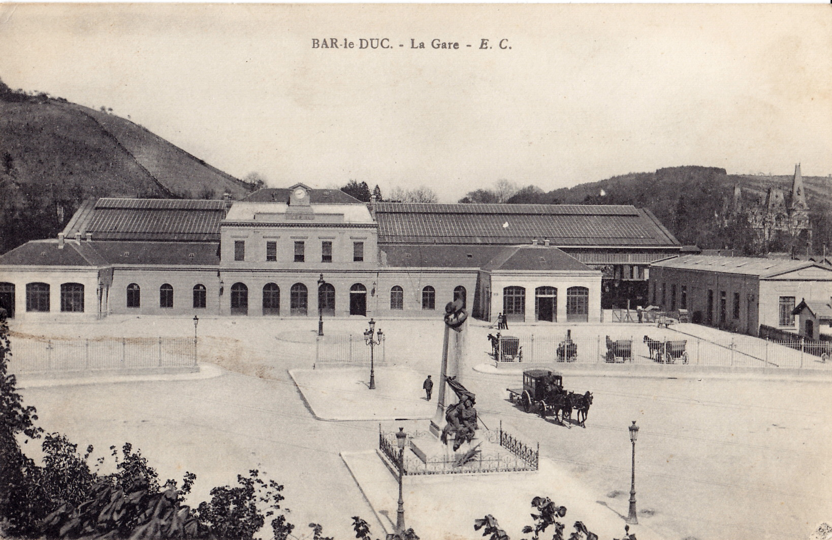 Carte postale ancienne éditée par EC : BAR-LE-DUC - La Gare